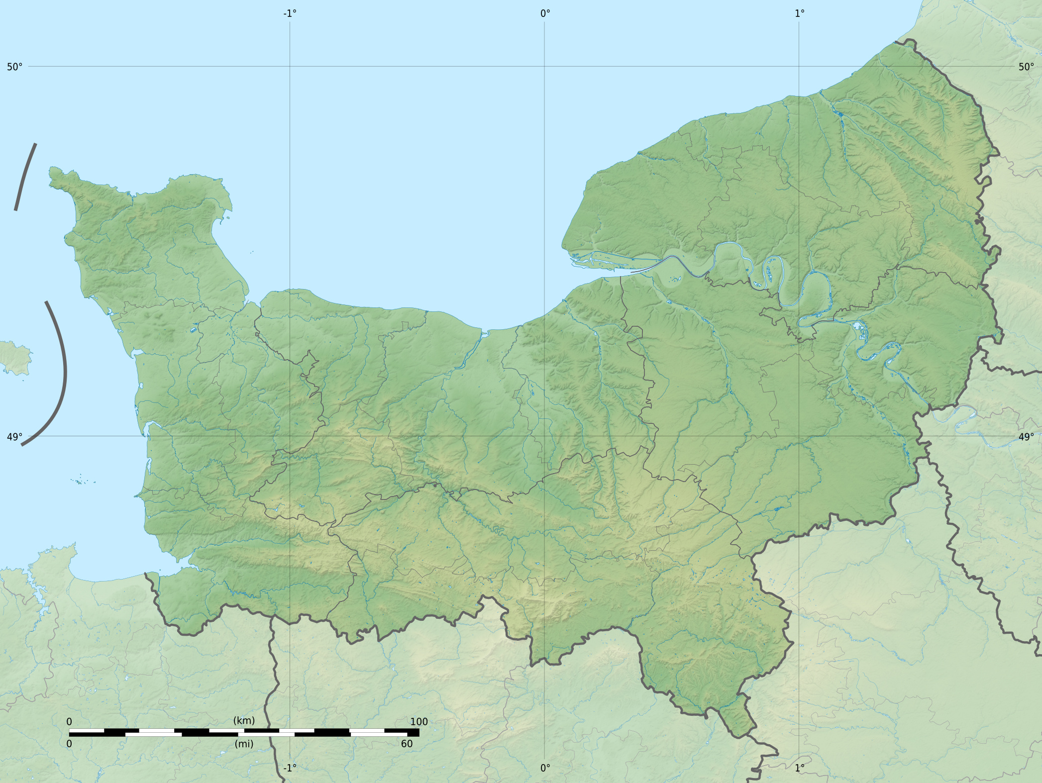 Carte topographique vierge de la région Normandie, France, destinée à la géolocalisation. Projection "Géoportail" (projection équirectangulaire à la latitude de référence 46.5° Nord) Limites géogrpahiques de la carte : West: -2.1395 E East: 1.955 E North: 50.182 N South: 48.062 N